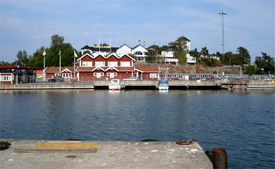 Grisslehams hamn